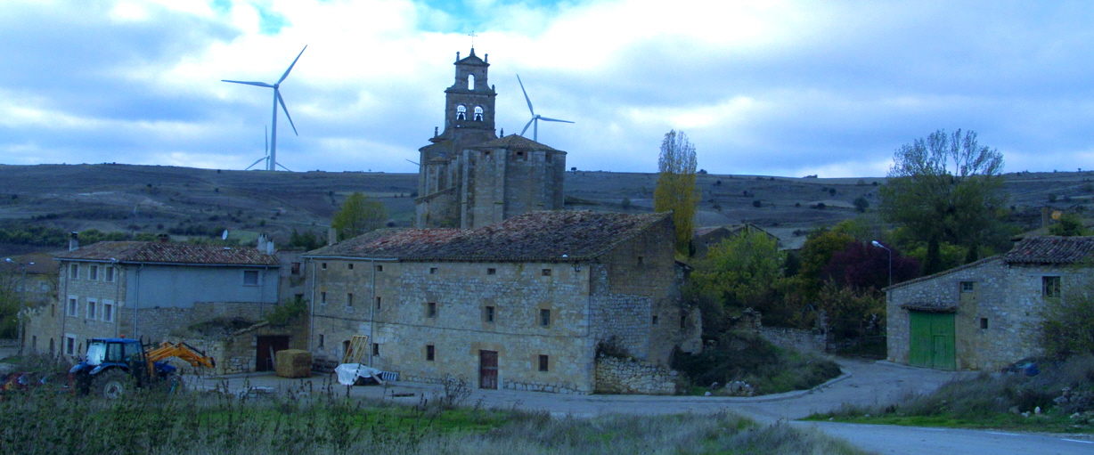 Parque eólico en Marmellar de Abajo, pedanía perteneciente a Pedrosa de Río Úrbel (Burgos, Castilla y León).